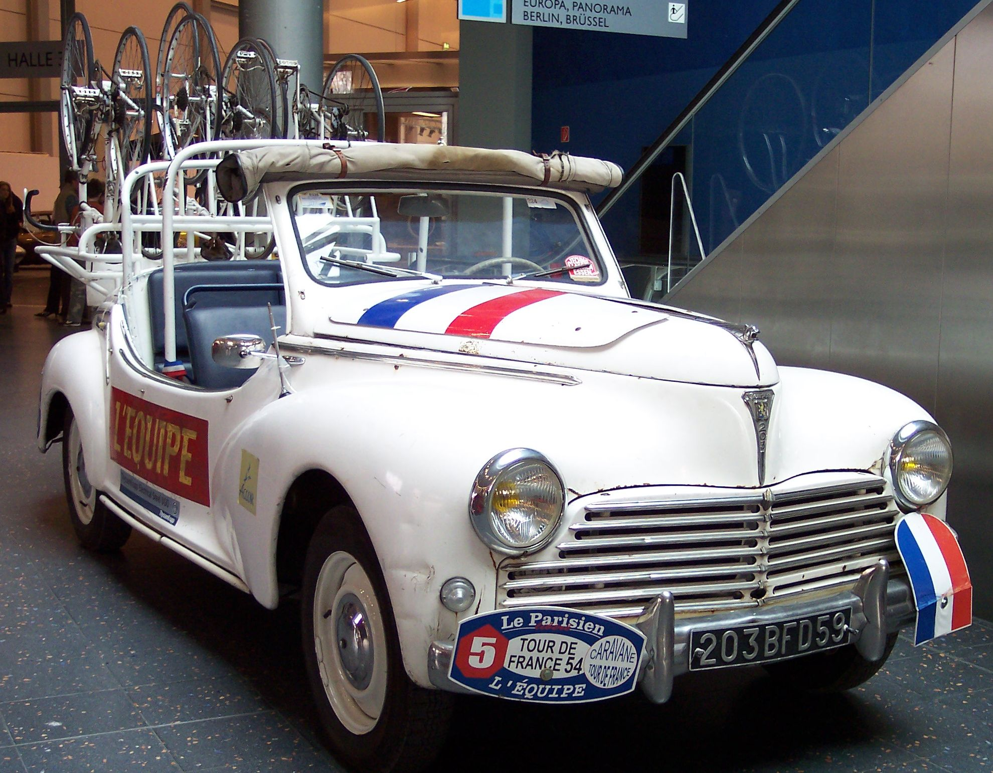 Peugeot 203 Tour de France-Fahrzeug 1954